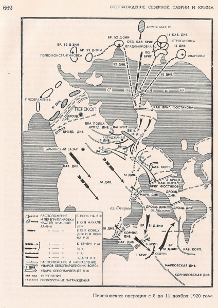 Перекопская операция